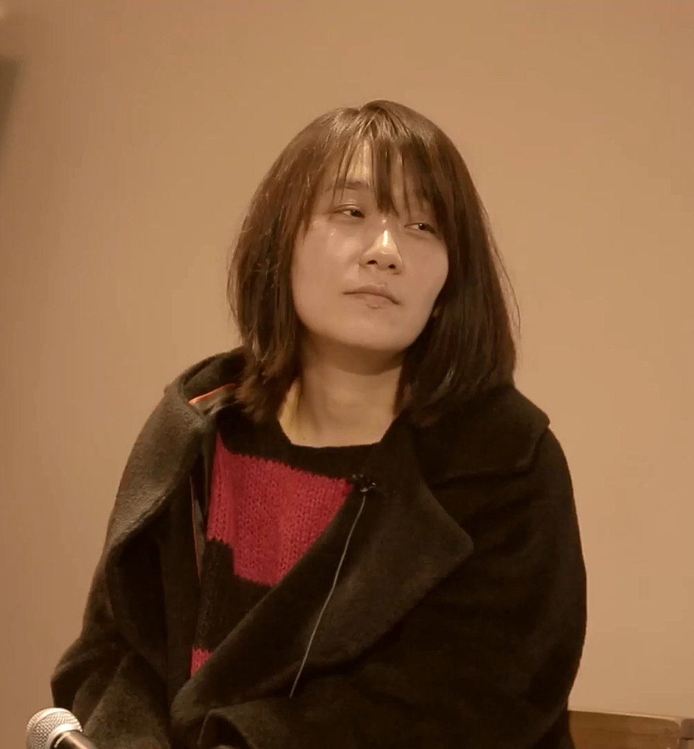 (G마켓x위즈돔) DreaminG 비전강연워크샵 -23 소설가 한강